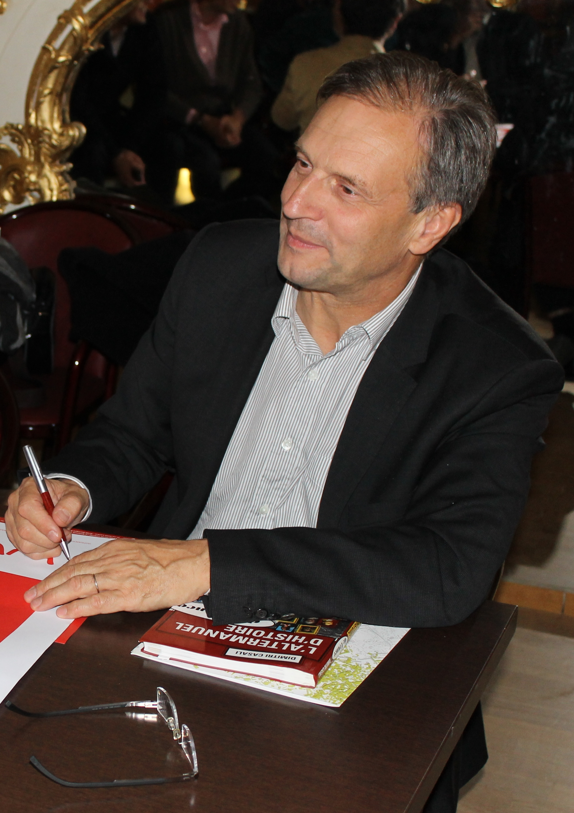 Jacques Lamblin, en octobre 2012.